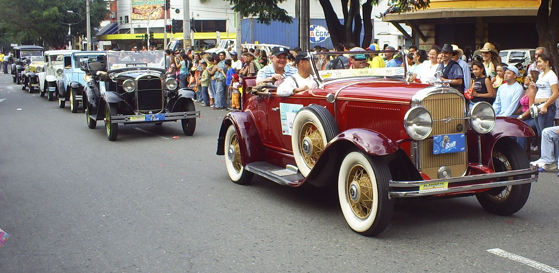 Desfile de Autos Clásicos y Antiguos en la Feria de las Flores, Medellín, Colombia